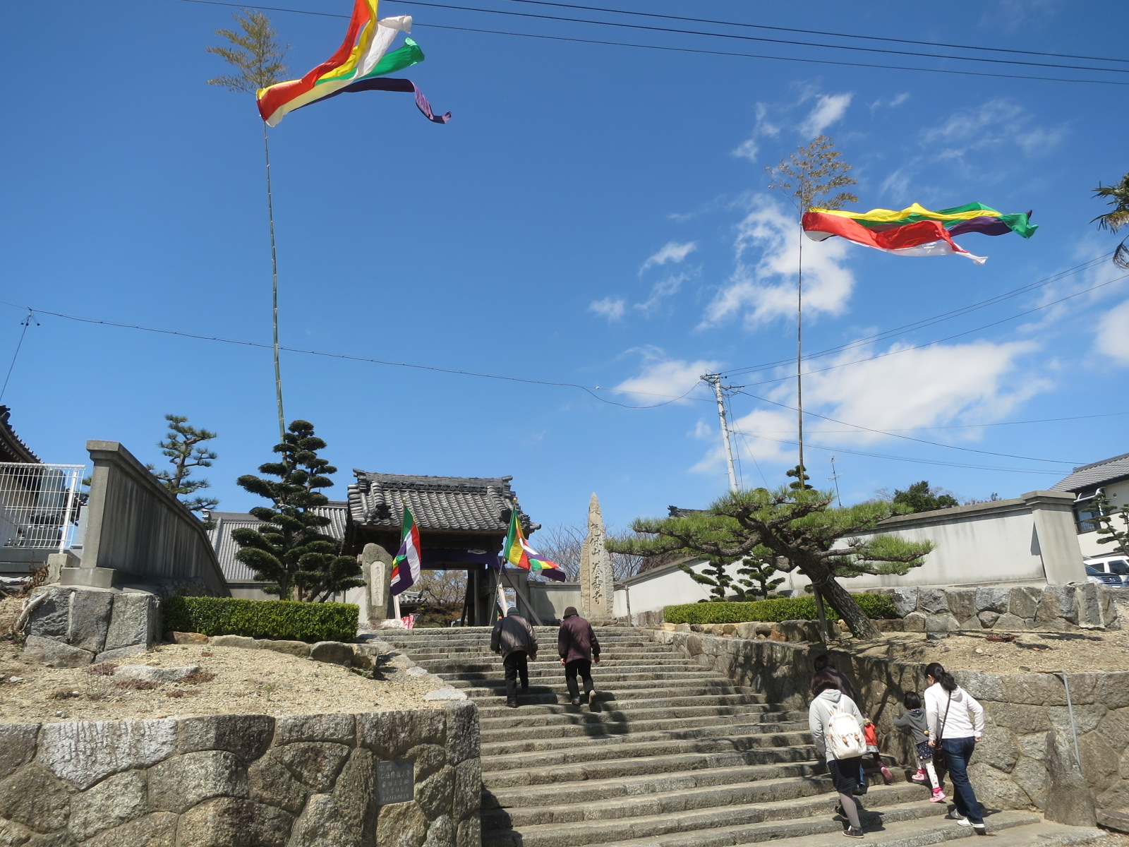 養寿寺（西尾市下矢田町）